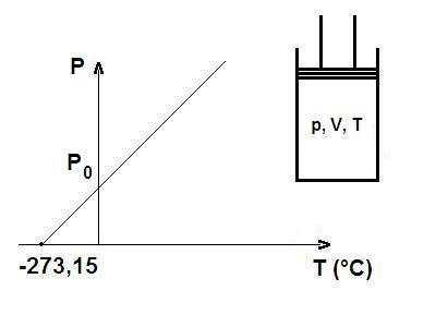 Rappresentazione grafica della 2° Legge di Gay Lussac (libro di chimica-fisica)